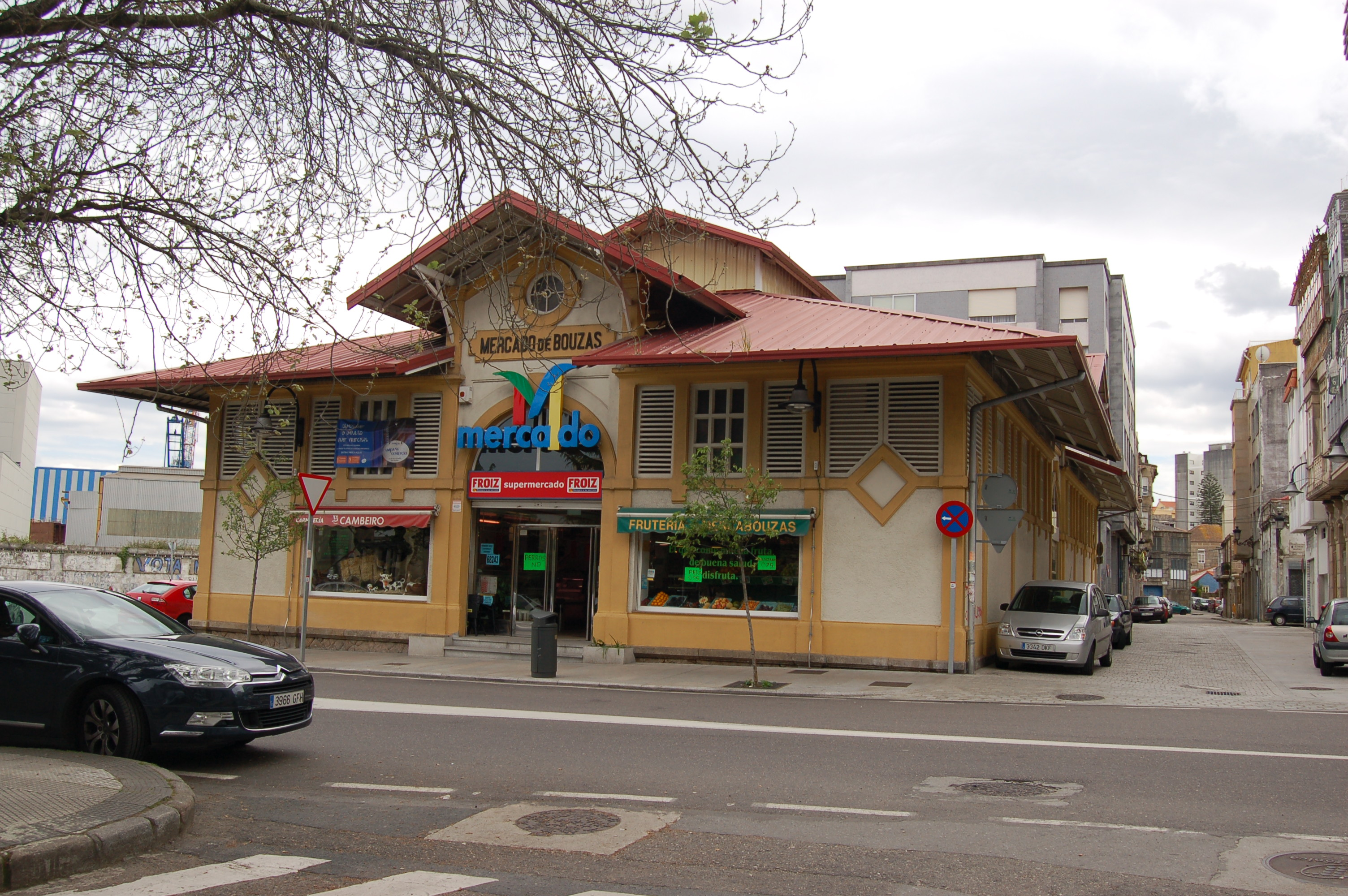 Mercado de Bouzas (Vigo)